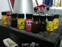 Find on poppers/amylnitrit fläschchen selbst fotografiert Bild-Versionen 10:24, 8. Sep 2005 . . Kretel . . 200 x 150 (24.555 Byte) (poppers/amylnitrit fläschchen selbst fotografiert)